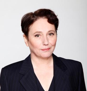 Bild: Bernd Jaworek/UFA Serial Drama GmbH